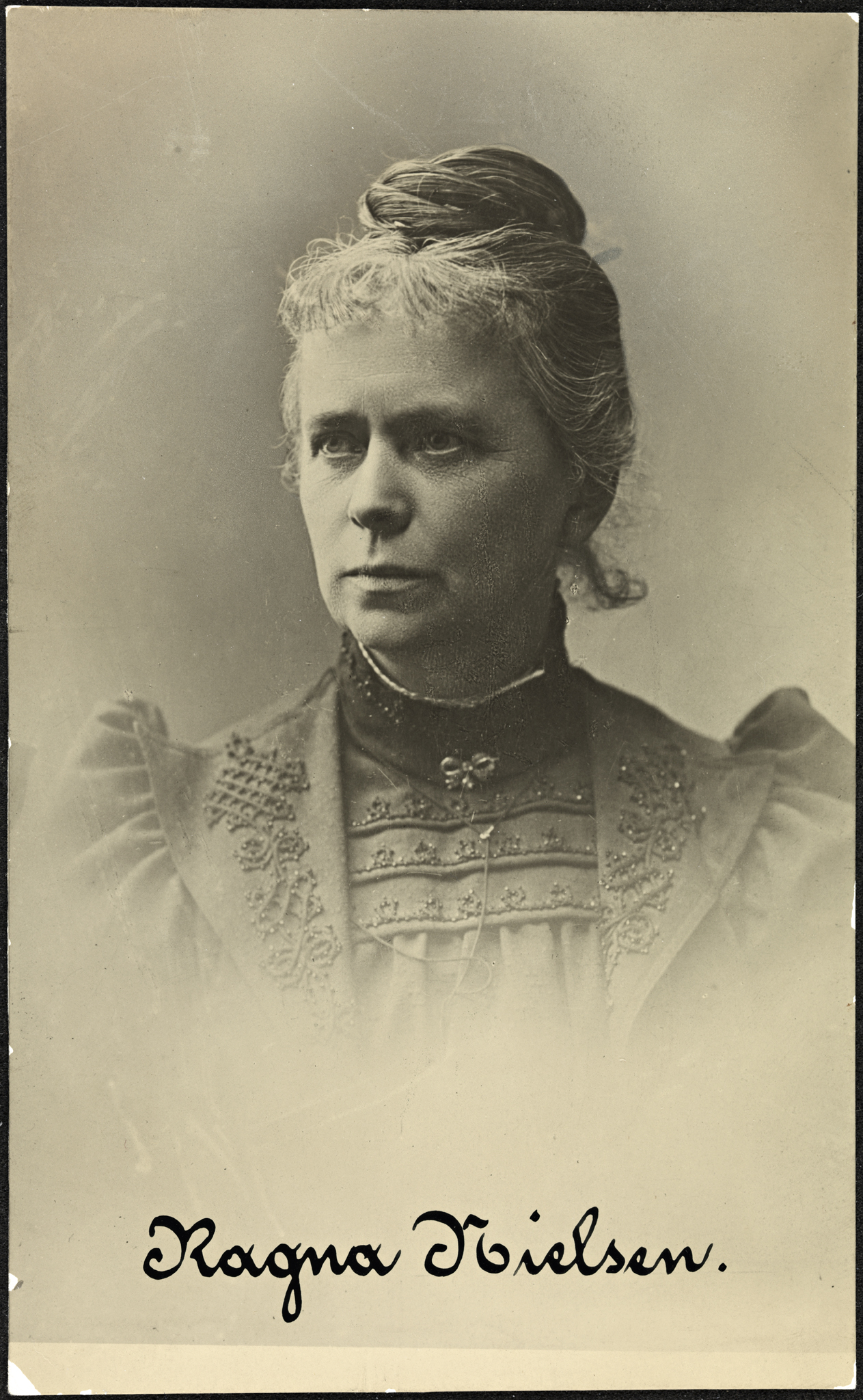 Tittel / Title: Portrett av Ragna Nielsen (1845-1924) Motiv / Motif: Postkort. Ragna Nielsen var norsk pedagog og kvinnesaksforkjemper, og deltok i grunnleggelsen av Norsk kvinnesaksforening. Dato / Date: ukjent / unknown Fotograf / Photographer: ukjent / unknown Eier / Owner Institution: Nasjonalbiblioteket / National Library of Norway Lenke / Link: Bildesignatur / Image Number: blds_05669